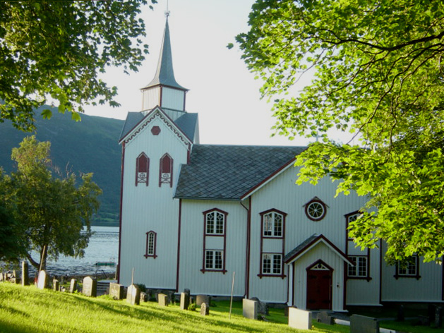 Gjemnes and the Øre kirke